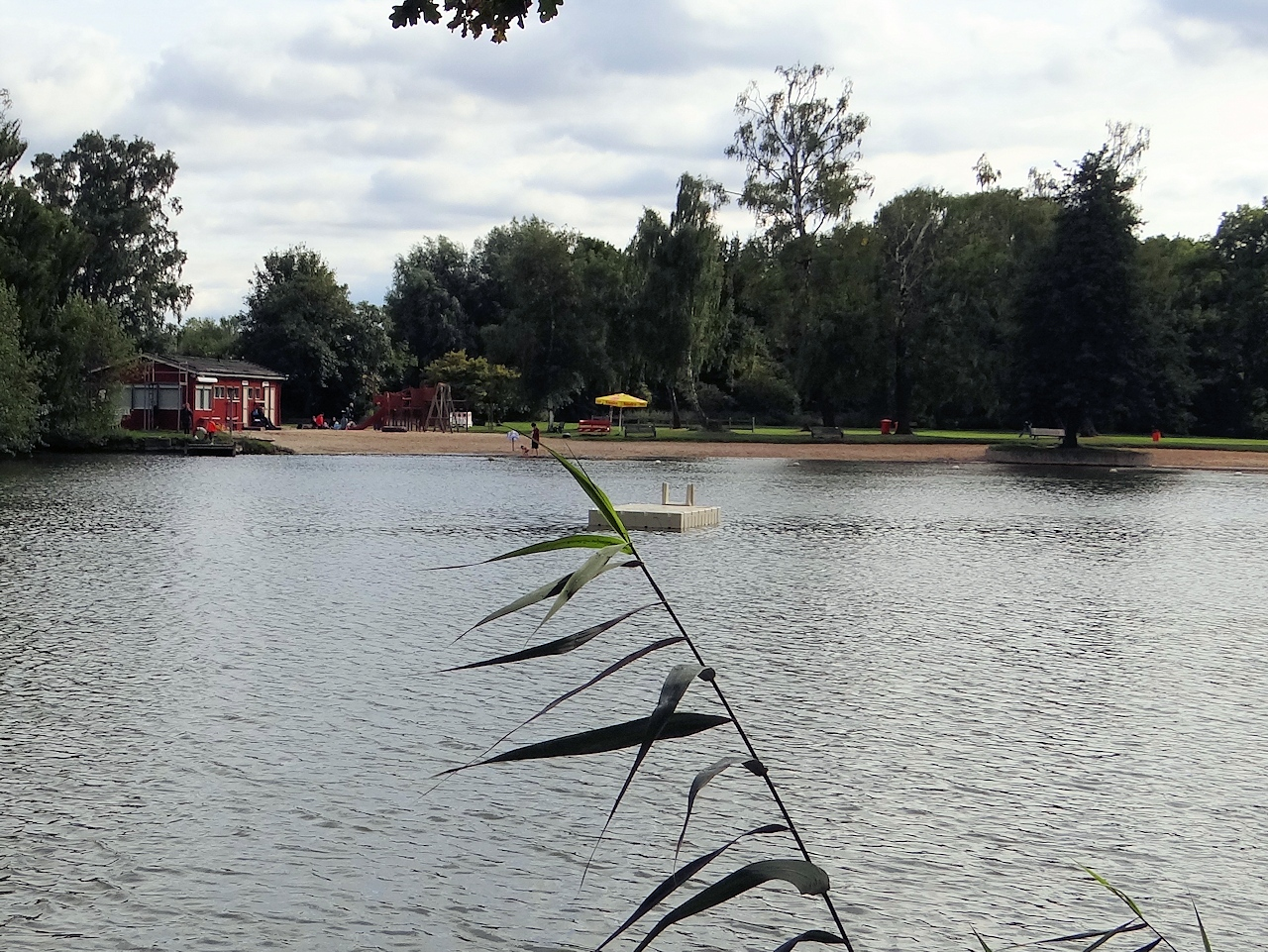 Freibad Kennel, Badeteich mit Badehaus, Blickrichtung Süden.